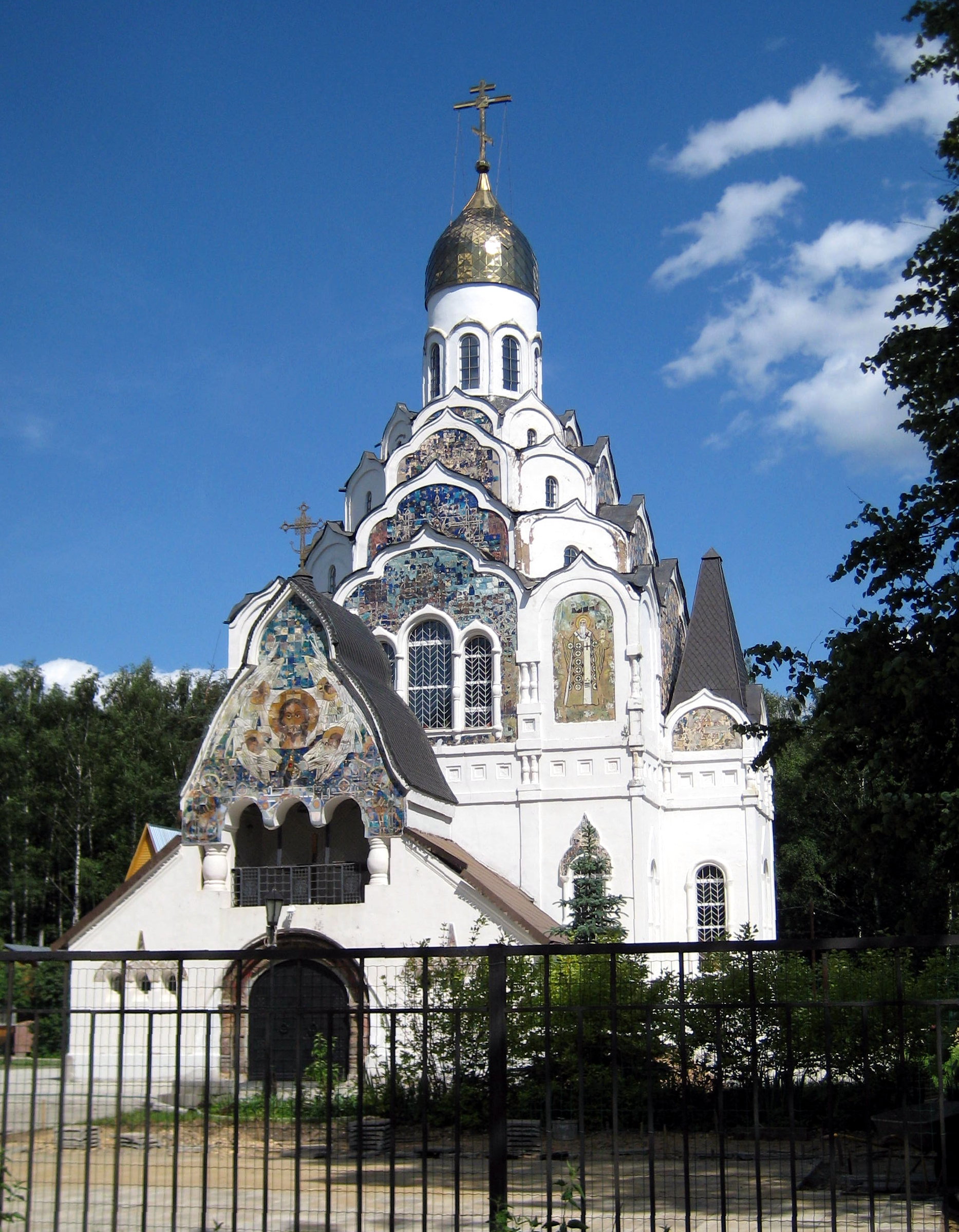 Церковь Спаса Нерукотворного Образа в Клязьме